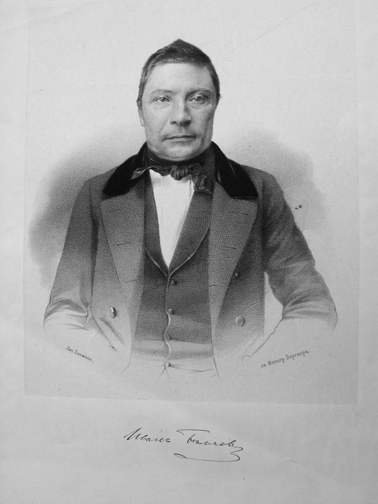 Иван Дмитриевич Беляев.